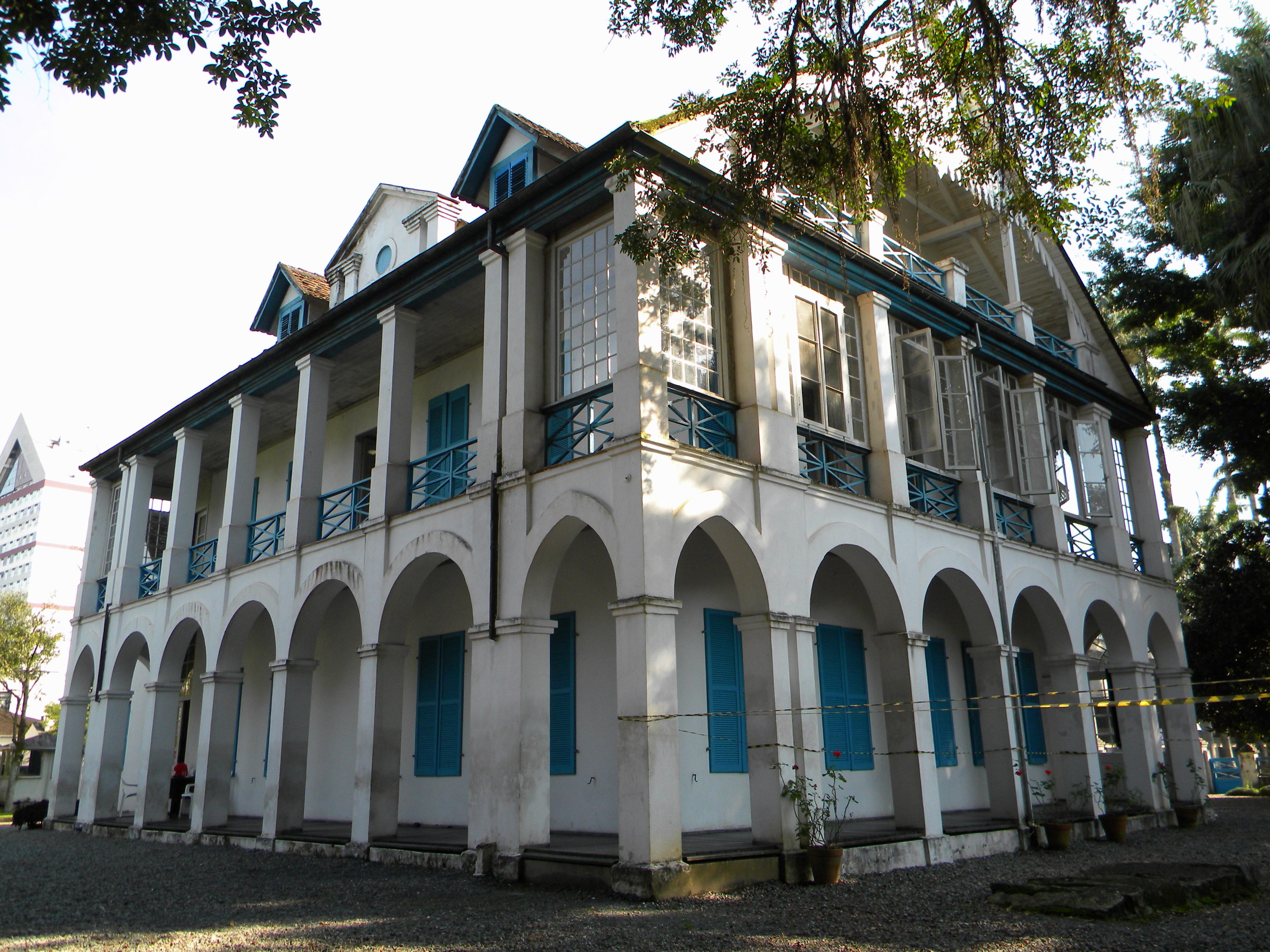 Palácio dos Príncipes de Joinville ou Palácio do Domínio Dona Francisca